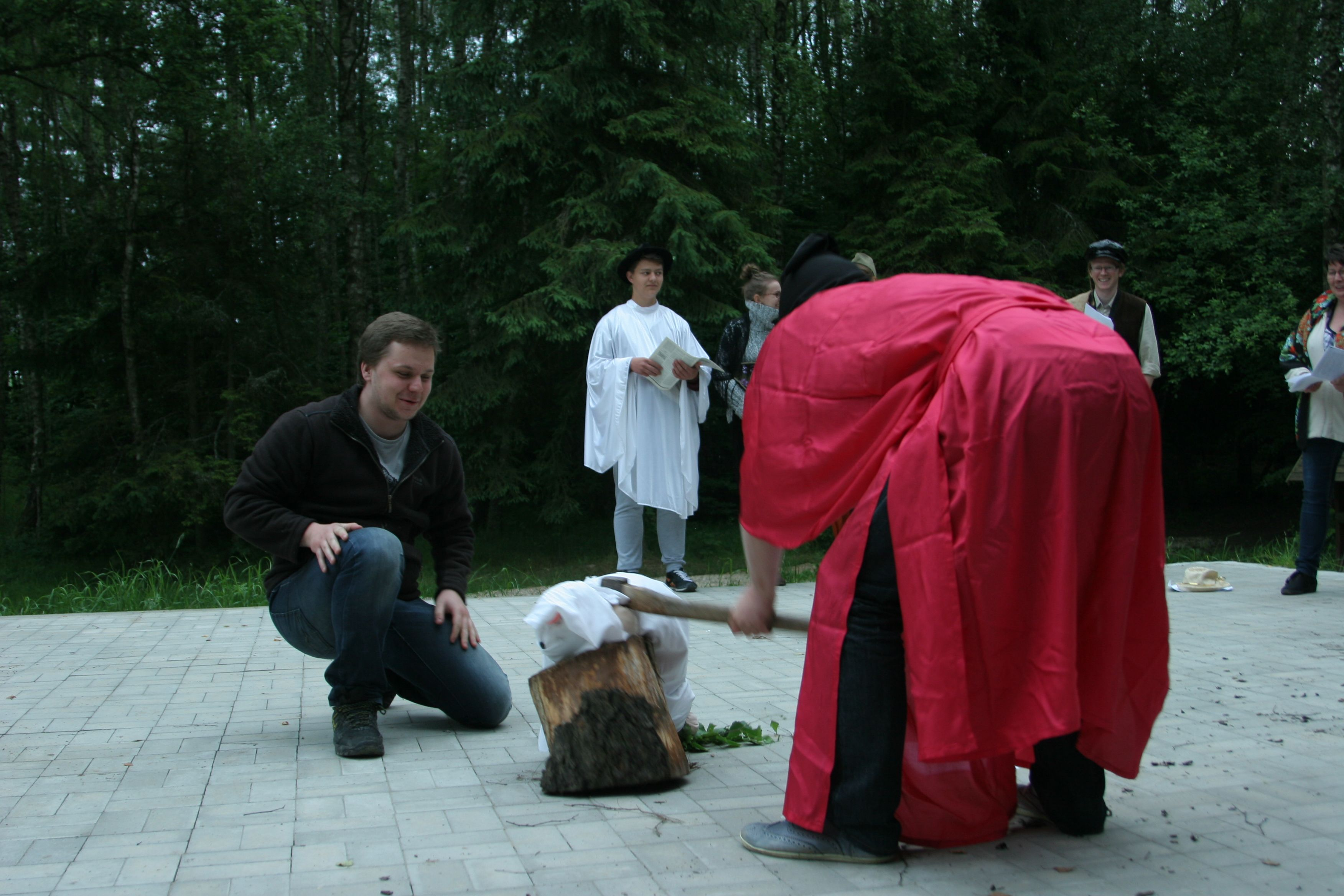 Uczestnicy obrzędu ścinania kani